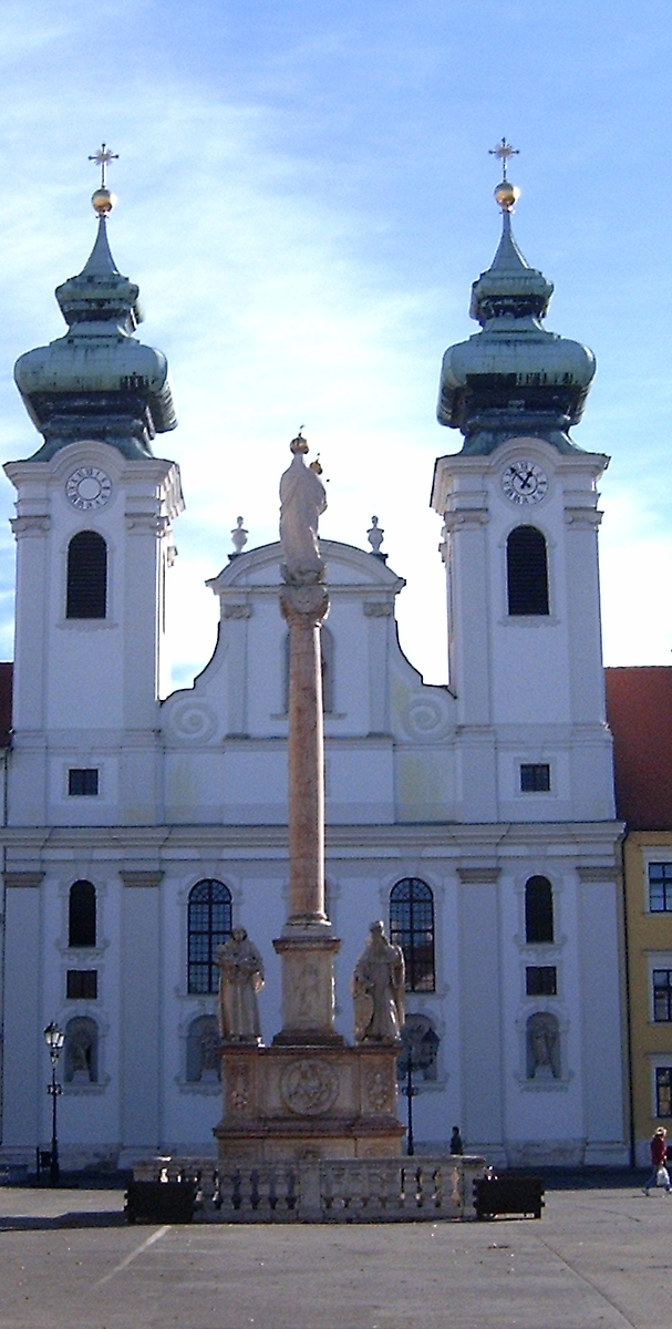 A győri Bencés templom (Győr-Moson-Sopron megye)